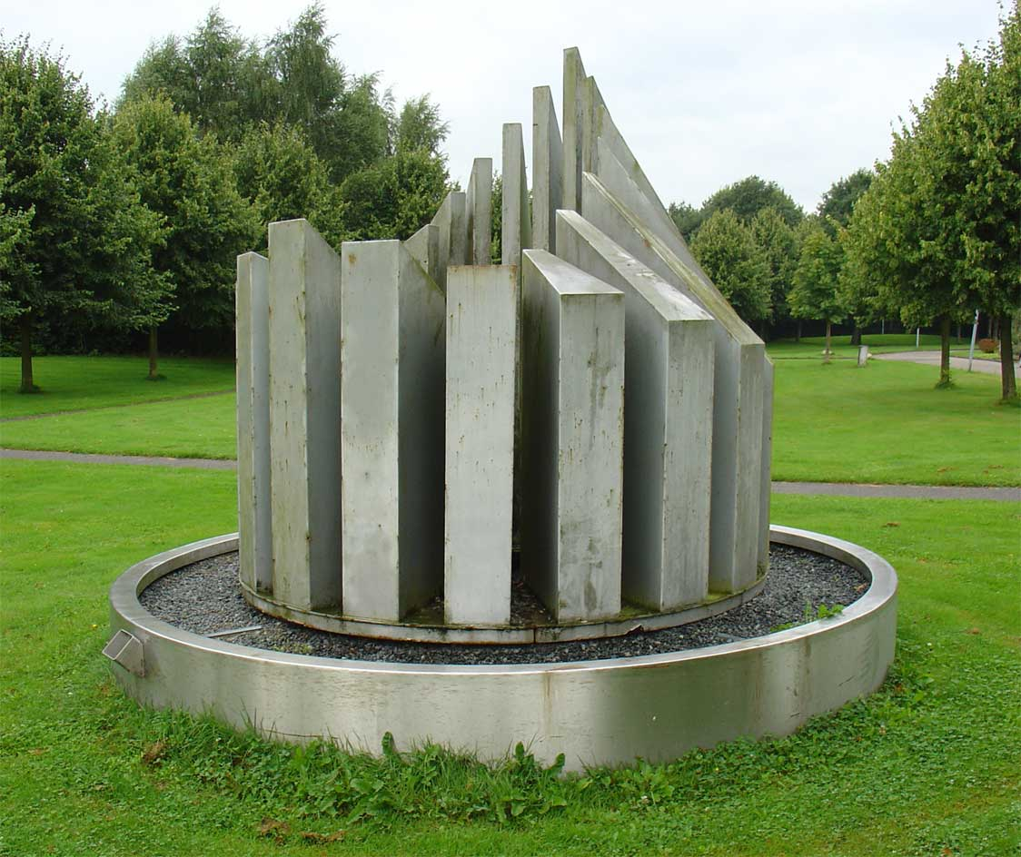 "Fibonacci in de kring" door Henk Crouwel - Annen